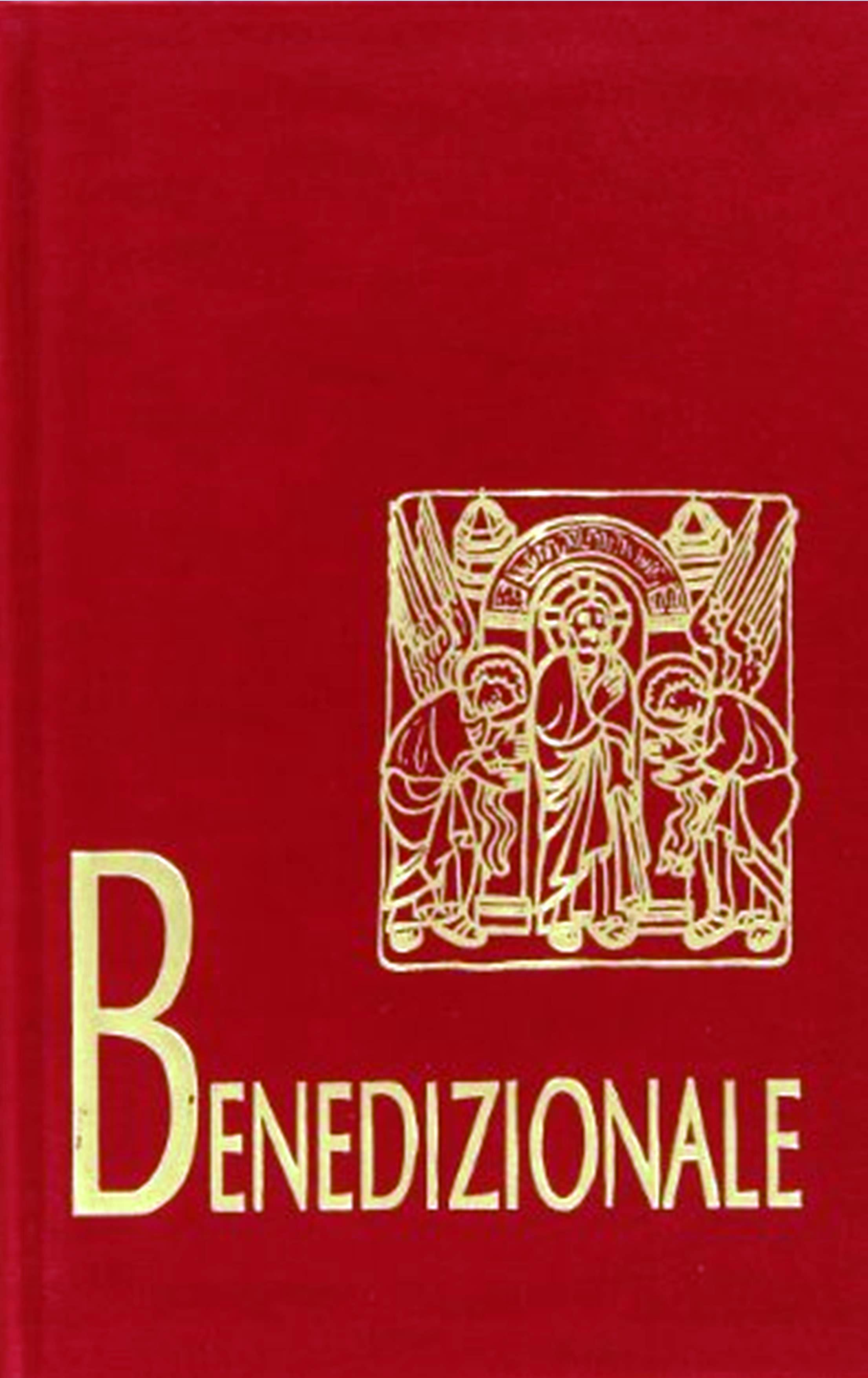 Copertina frontale del Libro del Benedizionale